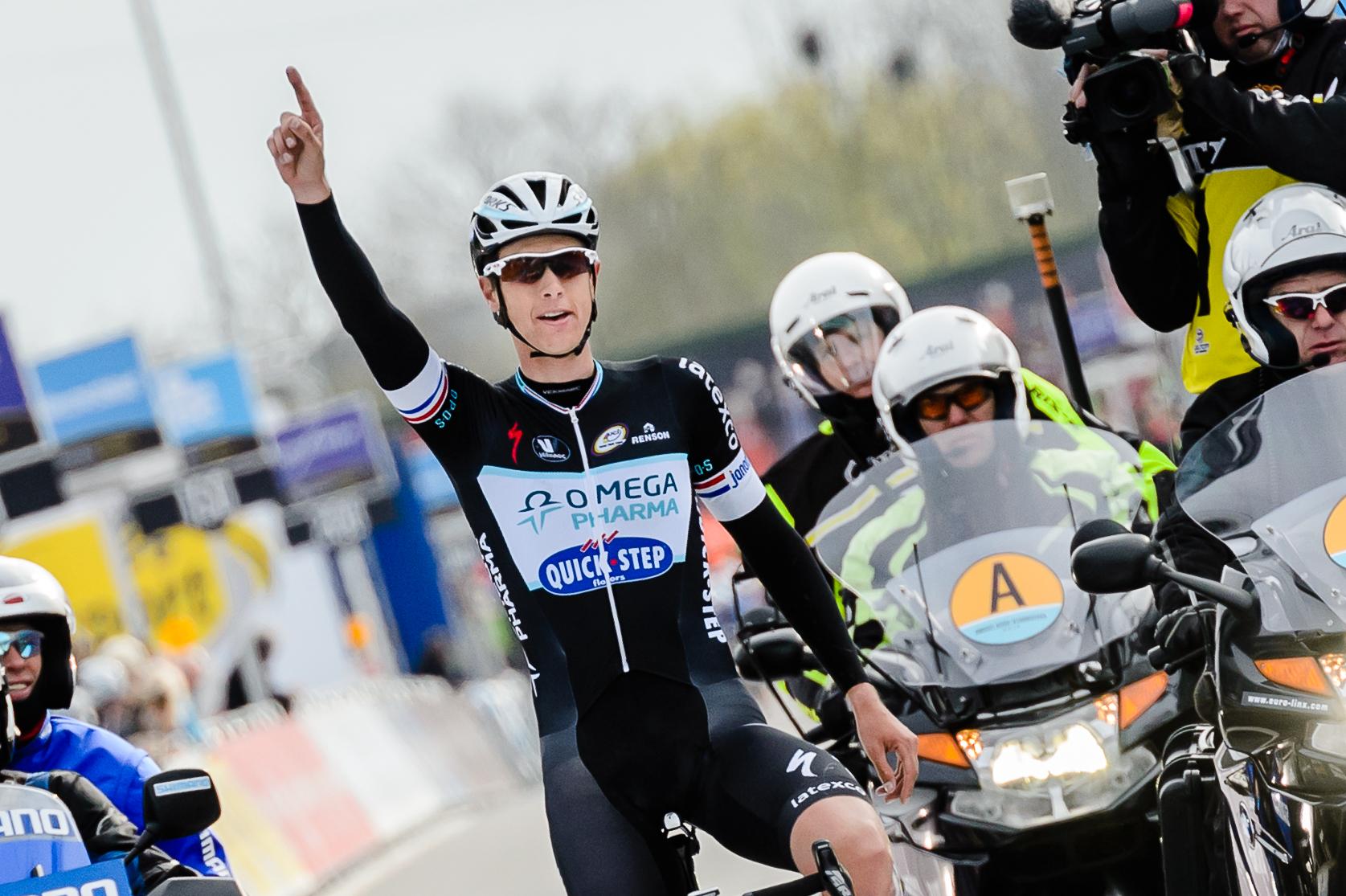 Net als in 2012 soleert de ex-kampioen van Nederland in 2014 naar de overwinning. Enkele weken later is hij ook de beste in Parijs-Roubaix.